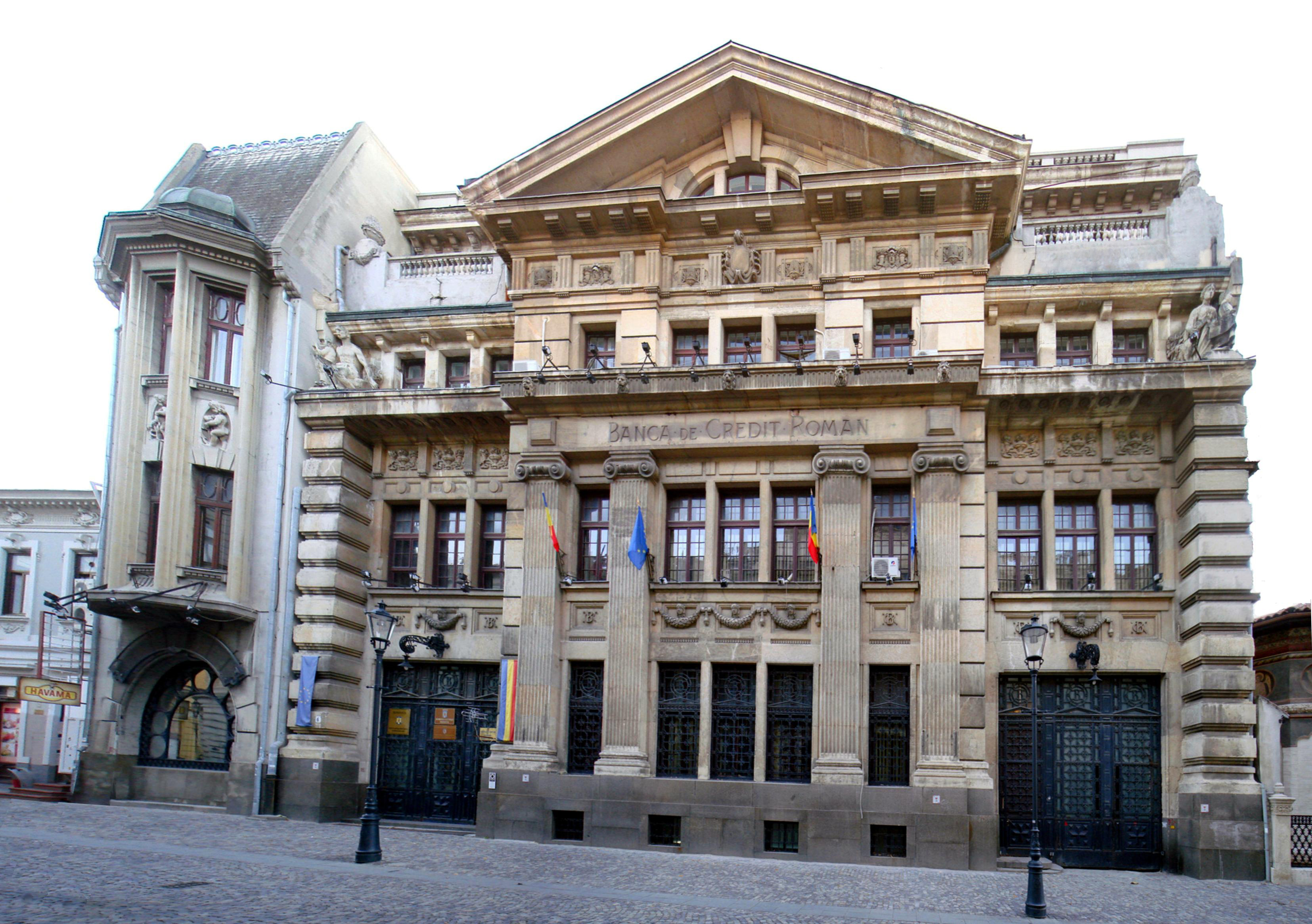 Clădirea fostei Bănci de Credit Român, din București